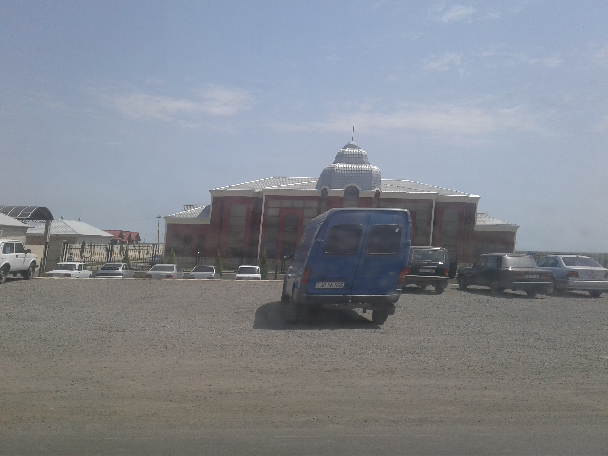 город Лиман (бывший Порт-Ильич)